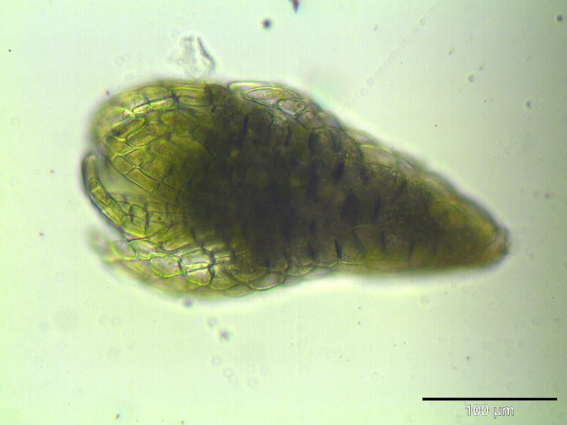 Zweifarbiges Birnmoos (Bryum barnesii), Brutkörper, Vergrößerung: 250x